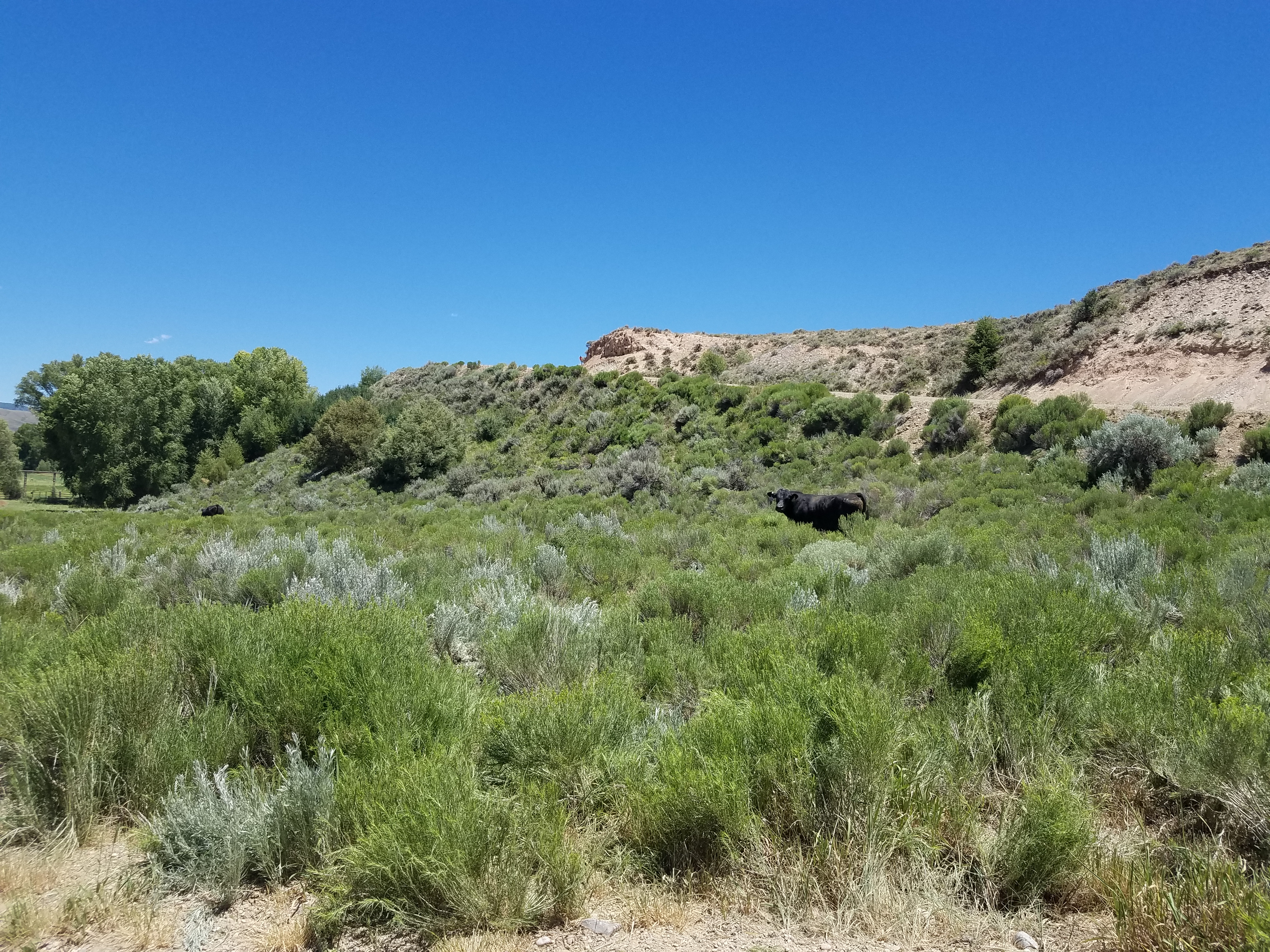 Troublesome, Colorado